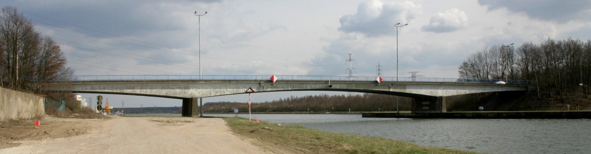 Bréck vu Zutendaal 2006. Zutendaal Breck Zutendaal